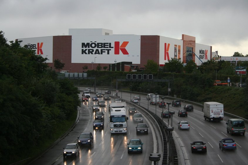 Möbel Kraft in Berlin